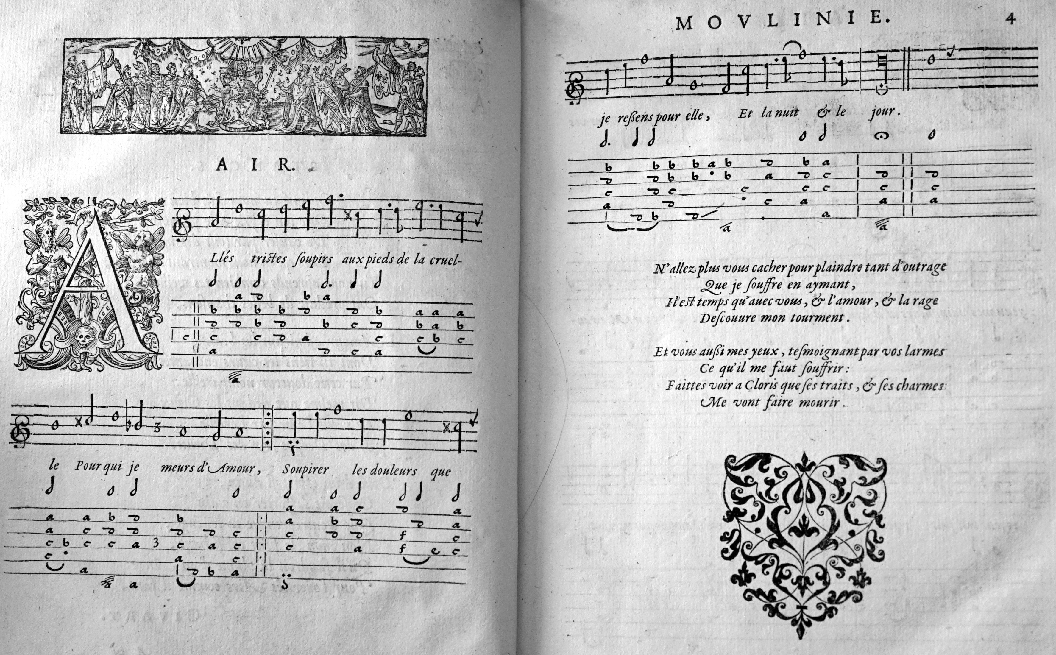 Airs de cour de E. Moulinié imprimé à Paris.